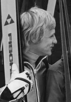 1976 Press Photo Willi Puerstl, Hans Georg Aschenbach & Jerry Martin on Iron Mt.